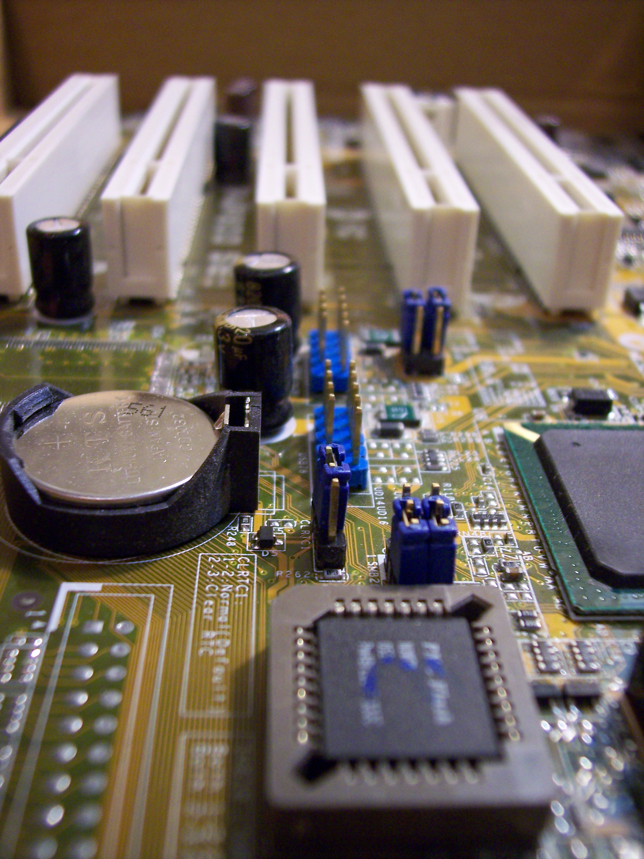 ASUS P4P800 SE